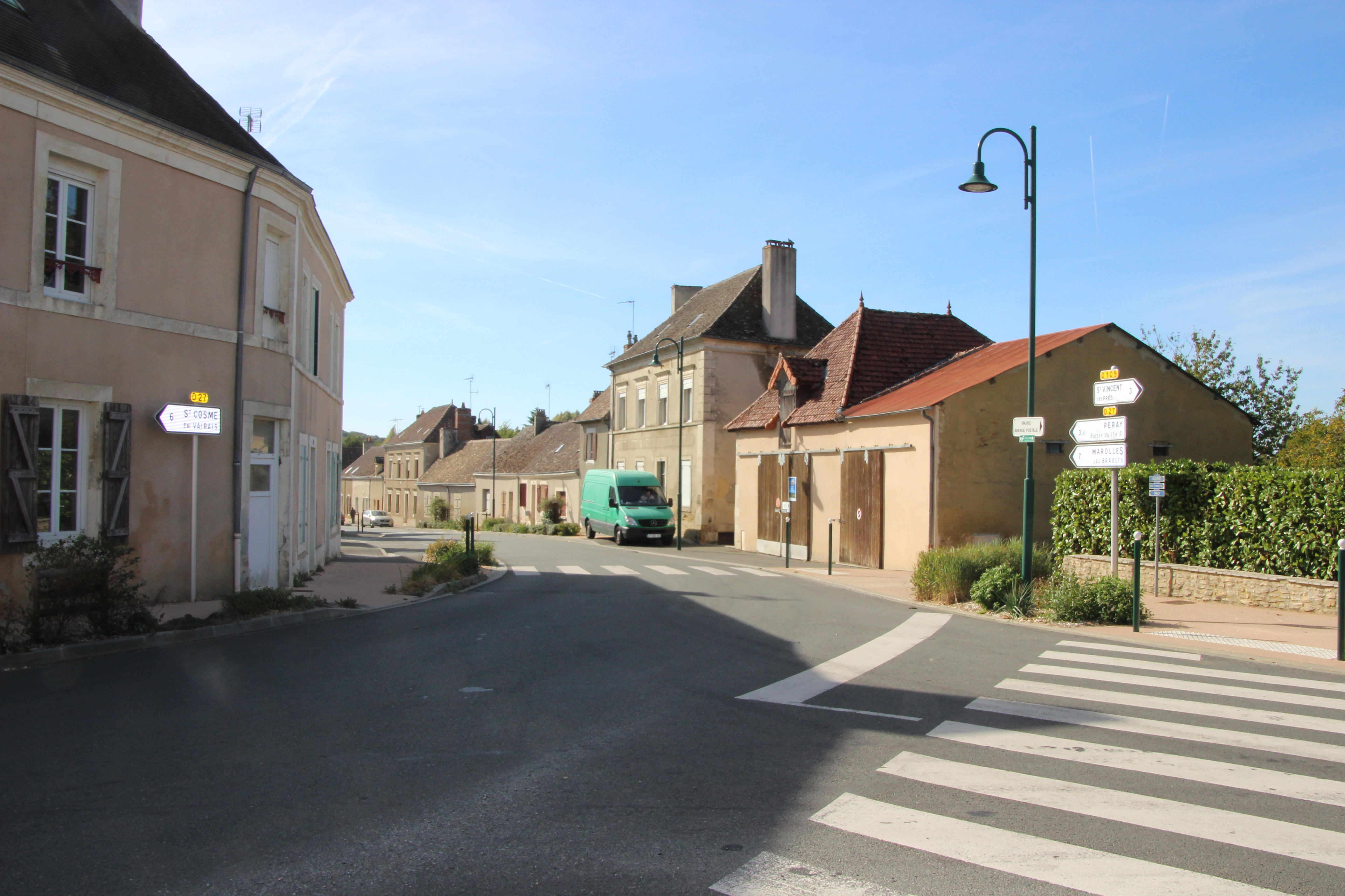 Moncé-en-Saosnois - wiki takes le Saosnois